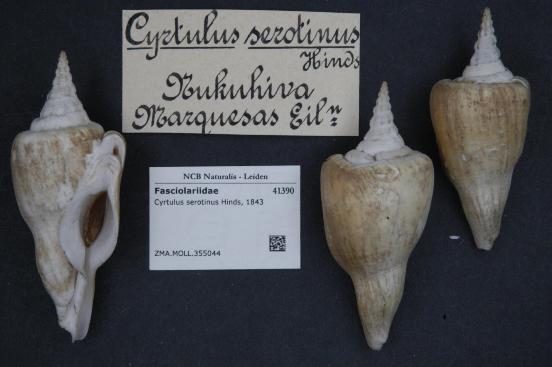 Cyrtulus serotinus Hinds, 1843